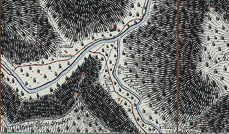 Schönheide im Erzgebirge: Ausschnitt aus Blatt 195 der Sächsischen Meilenblätter in der Berliner Ausgabe von 1791. (Hier ist der Link zum Digitalisat in der Staats- und Universitätsbibliothek Dresden) Der Ortsteil Wilzschhaus liegt an der Mündung der Wilzsch in die Zwickauer Mulde, in der Karte wird die Siedlung Wilzschhaus nicht erwähnt. Die roten Markierungen stellen Felsen dar, nicht Häuser. Hinweis: Karte ist nicht genordet!